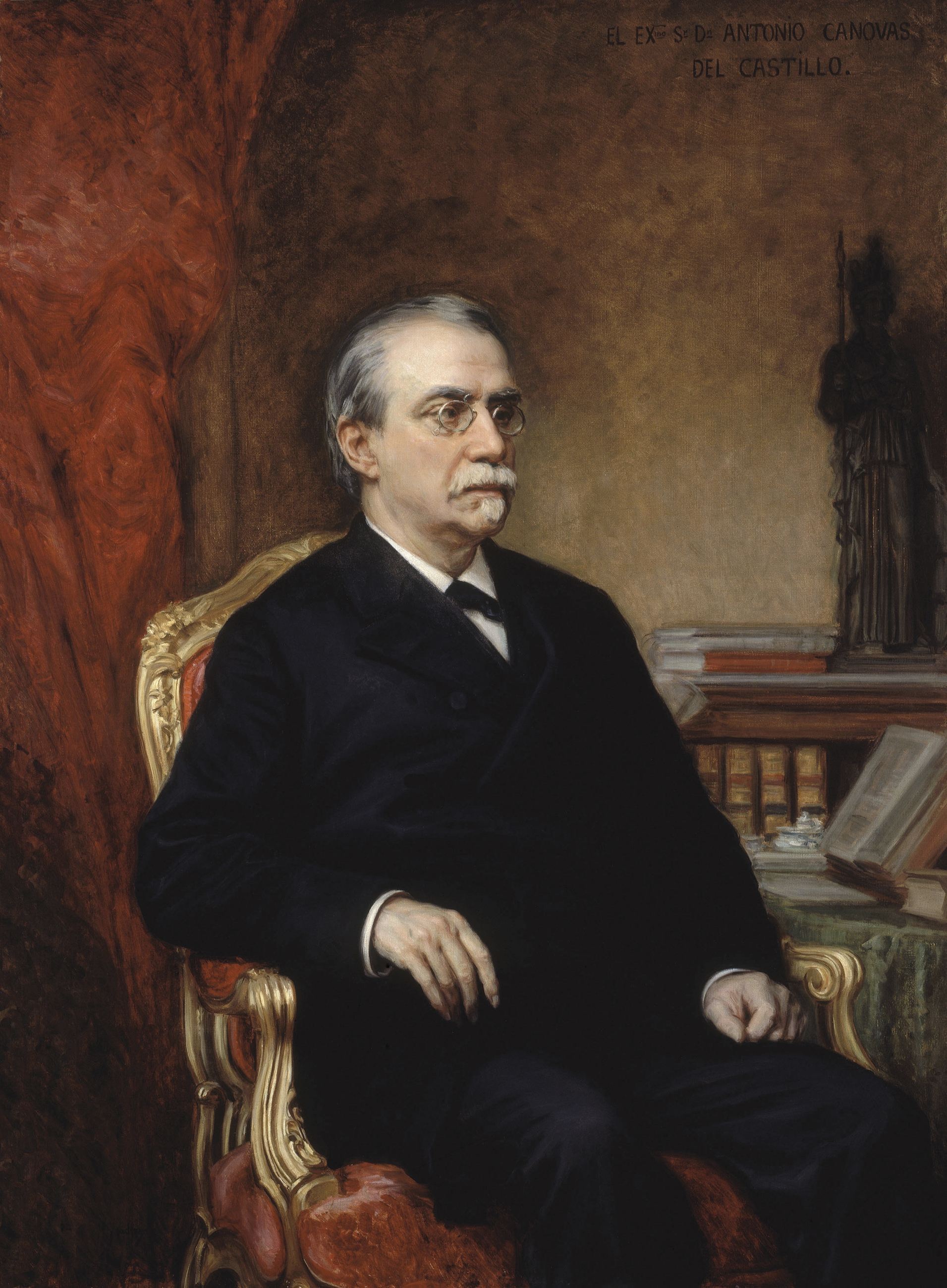 Retrato del politico e historiador español Antonio Cánovas del Castillo (1828-1897), que llegó a ser presidente del Consejo de Ministros de España en varias ocasiones y murió asesinado por el anarquista Michele Angiolillo en 1897.